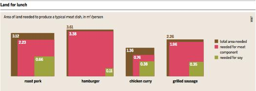 Espace requis pour la création d'un repas